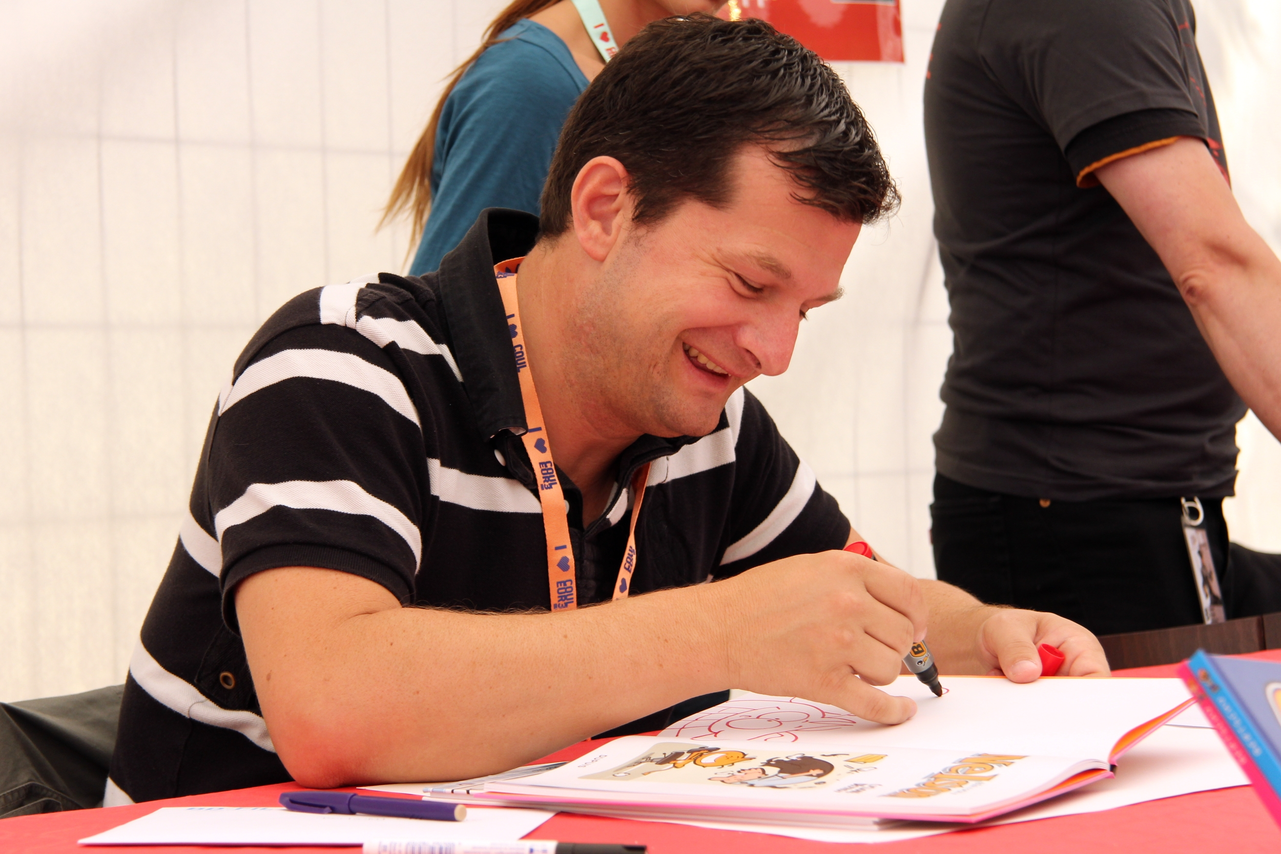 Christophe Bertschy signiert das Nelson-Album Cyclone destroy (BDFIL – Festival de bande dessinée Lausanne 2013)